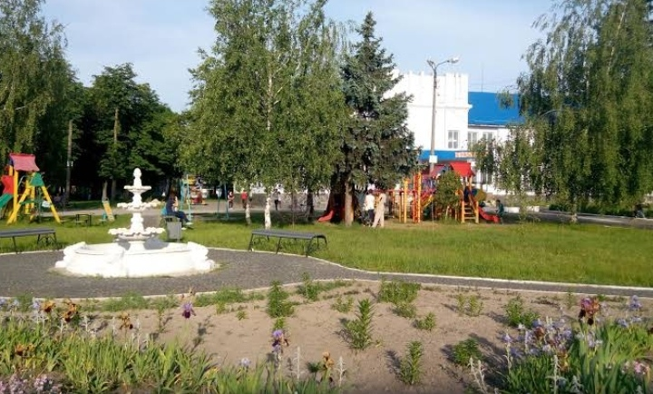 Парк